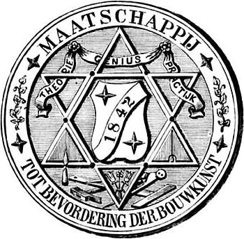 Logo van de Maatschappij tot Bevordering der Bouwkunst, Amsterdam.